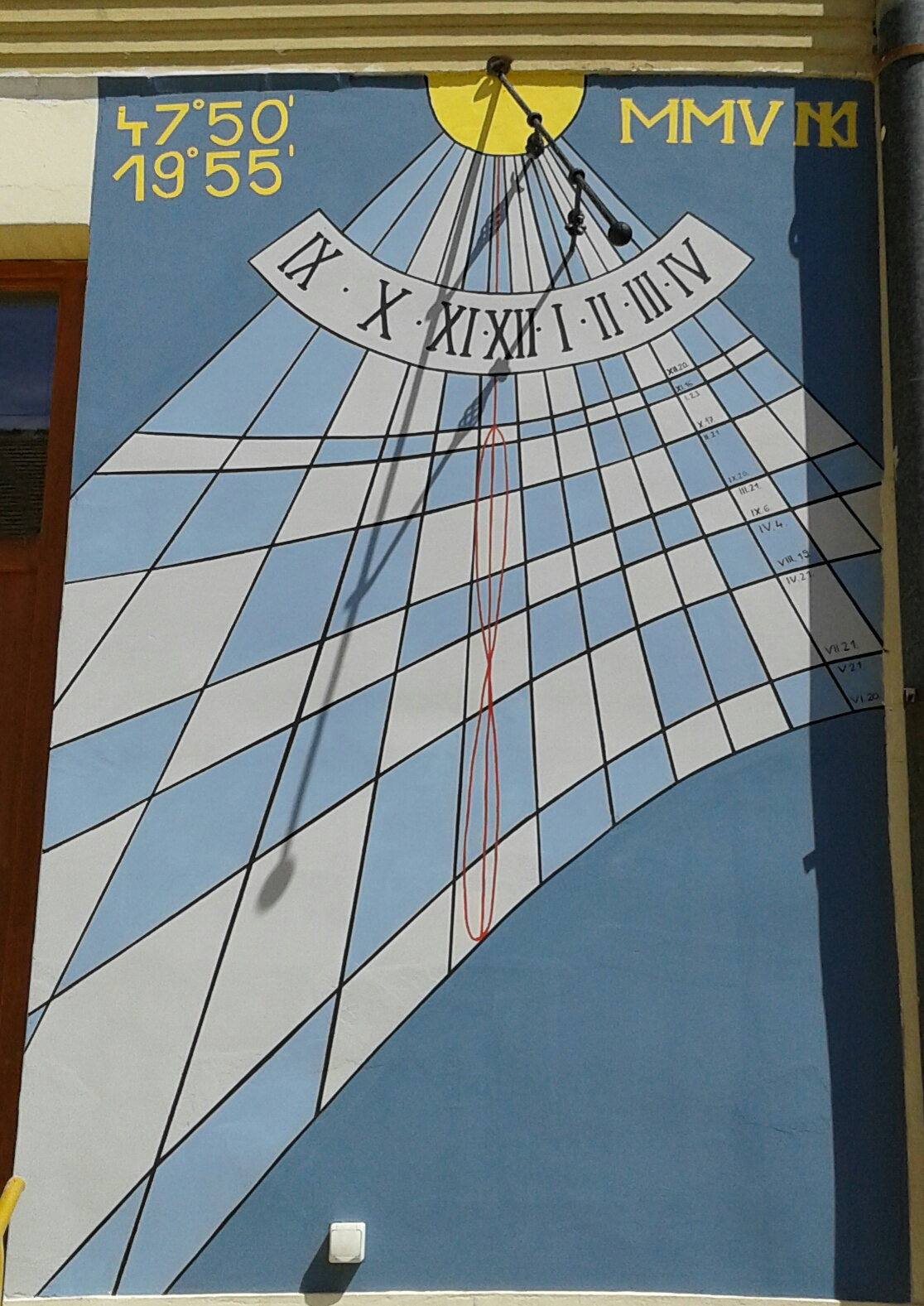 A gyöngyösi Berze Nagy János Gimnázium napórája. A napóra 2005-ben került a falra. A napóra mutatja az időt és a dátumot is. Tervezője az iskola egyik fizikatanára, dr. Kiss Miklós.